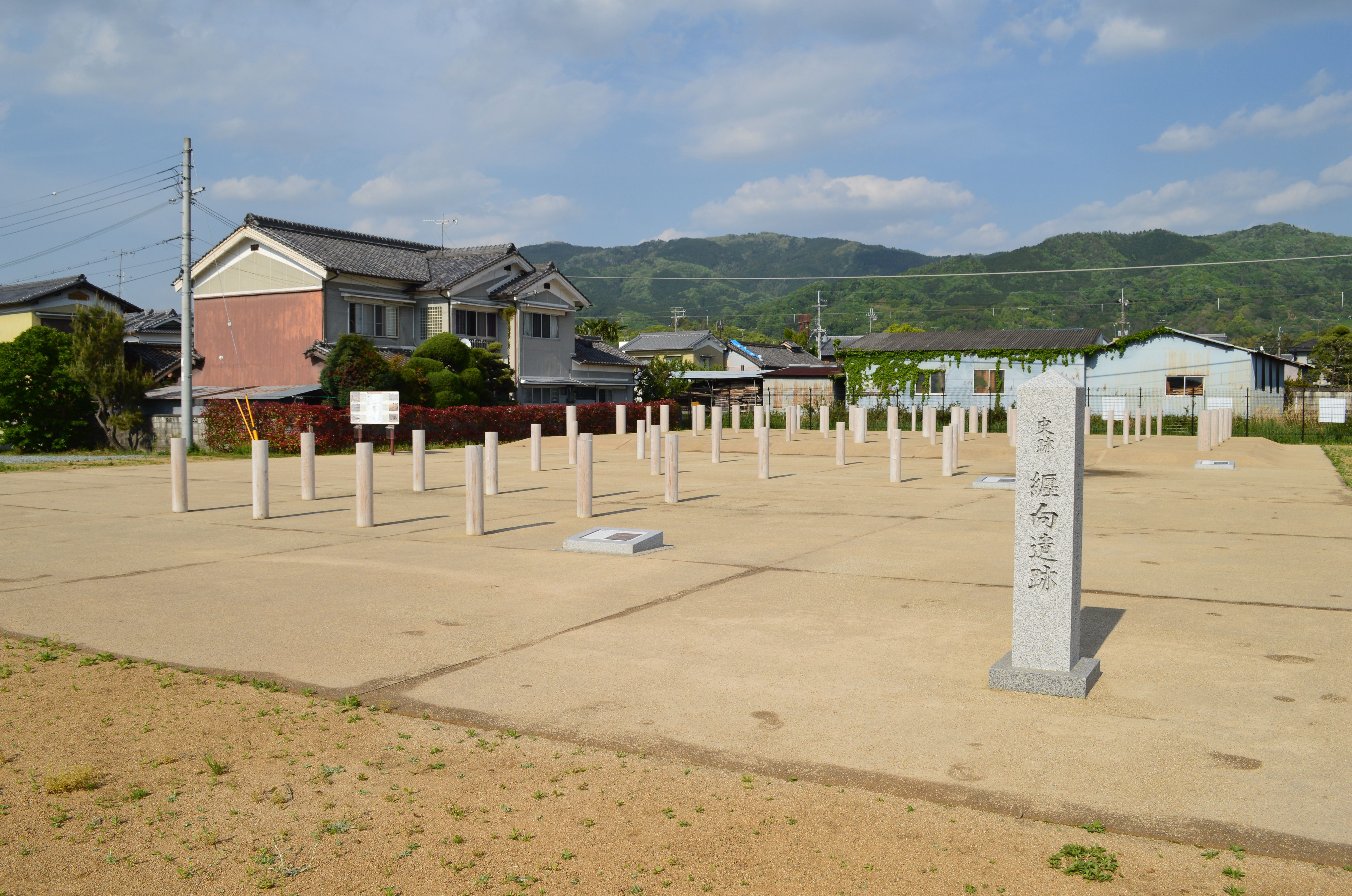 纒向遺跡辻地区 建物群